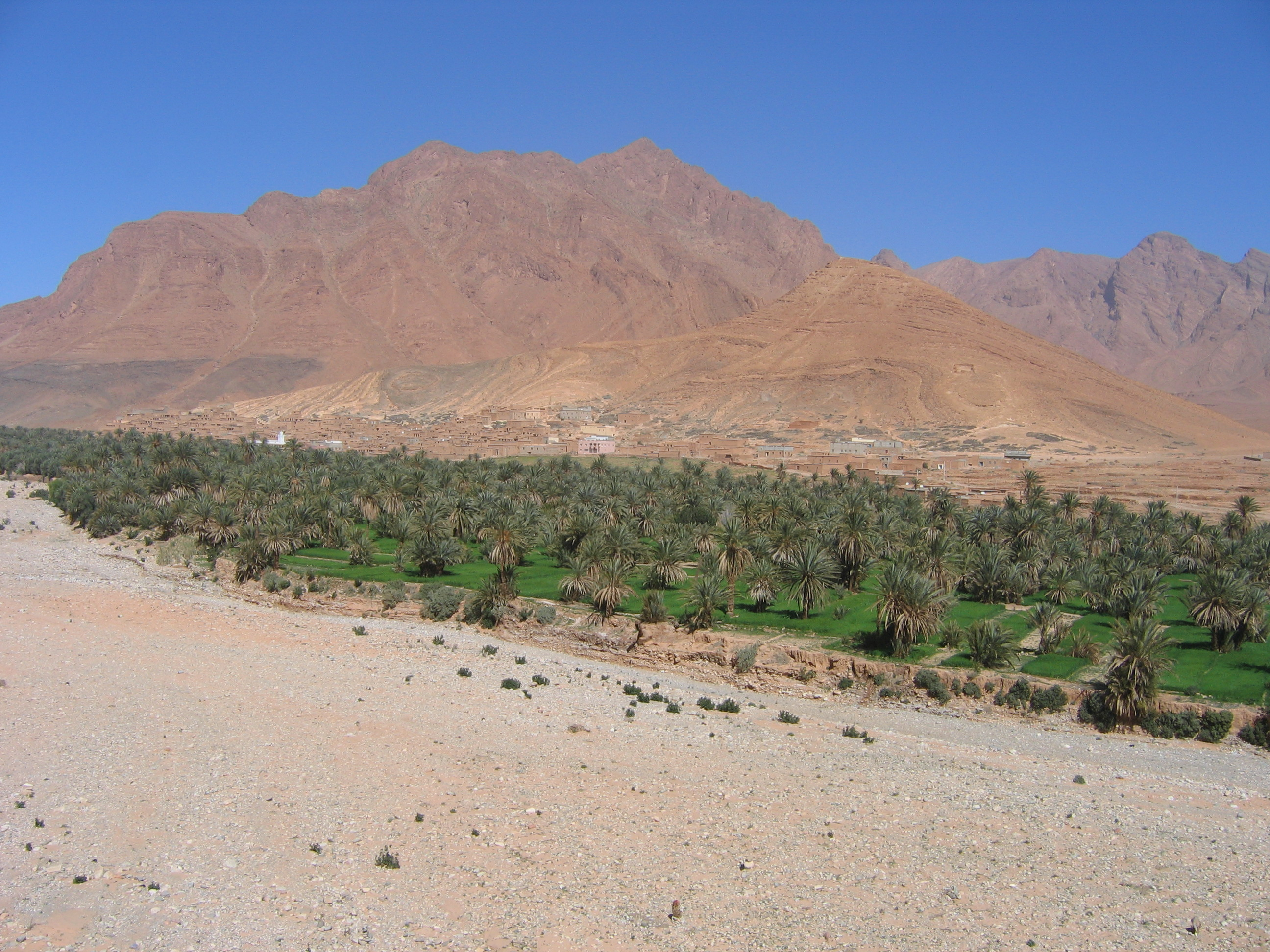 Akka et sa palmeraie dans le sud marocain (Province de Tata)